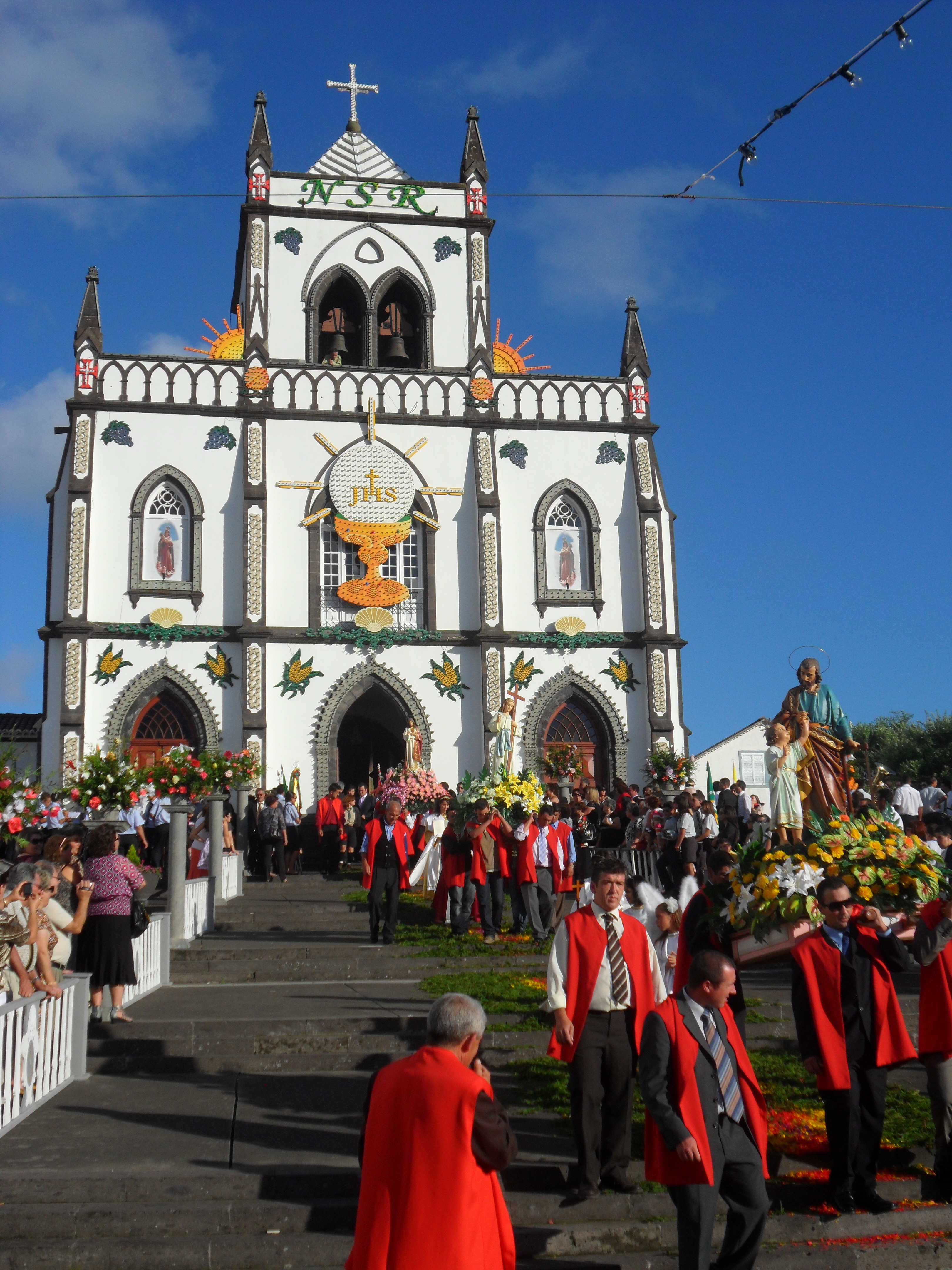 Igreja de Nossa Senhora dos Remédios, Lomba do Loução. Festa de Setembro